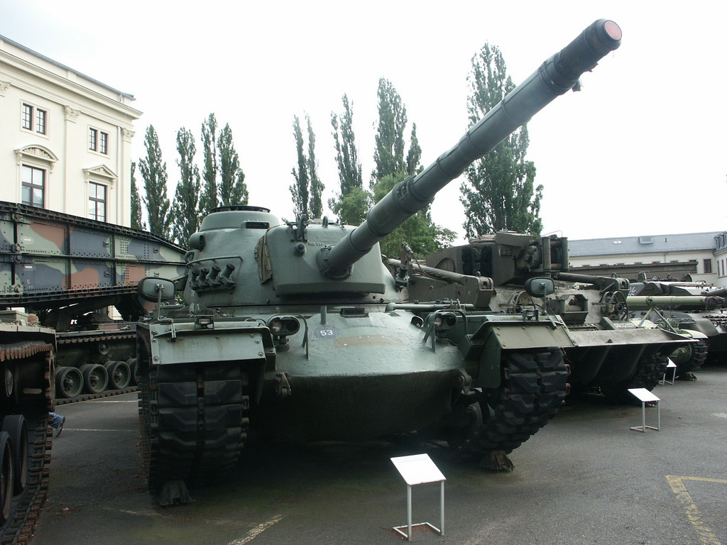 Bundeswehrmuseum Dresden mit Teilen von der NVA Remark: M48A2GA2 Patton tank.